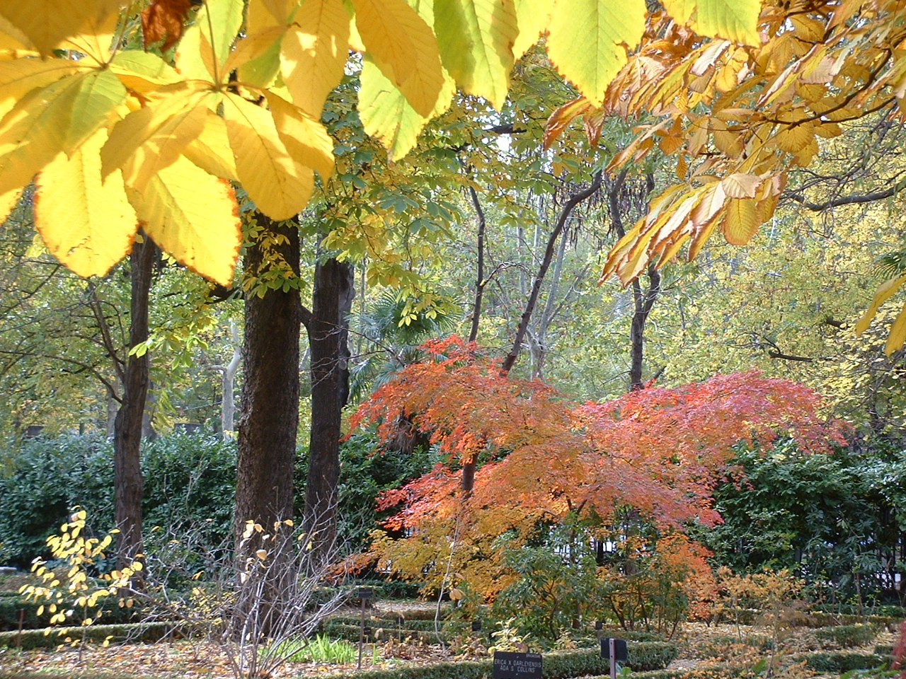 Foto del Jardín Botánico de Madrid tomada en otoño 2005 por aepef